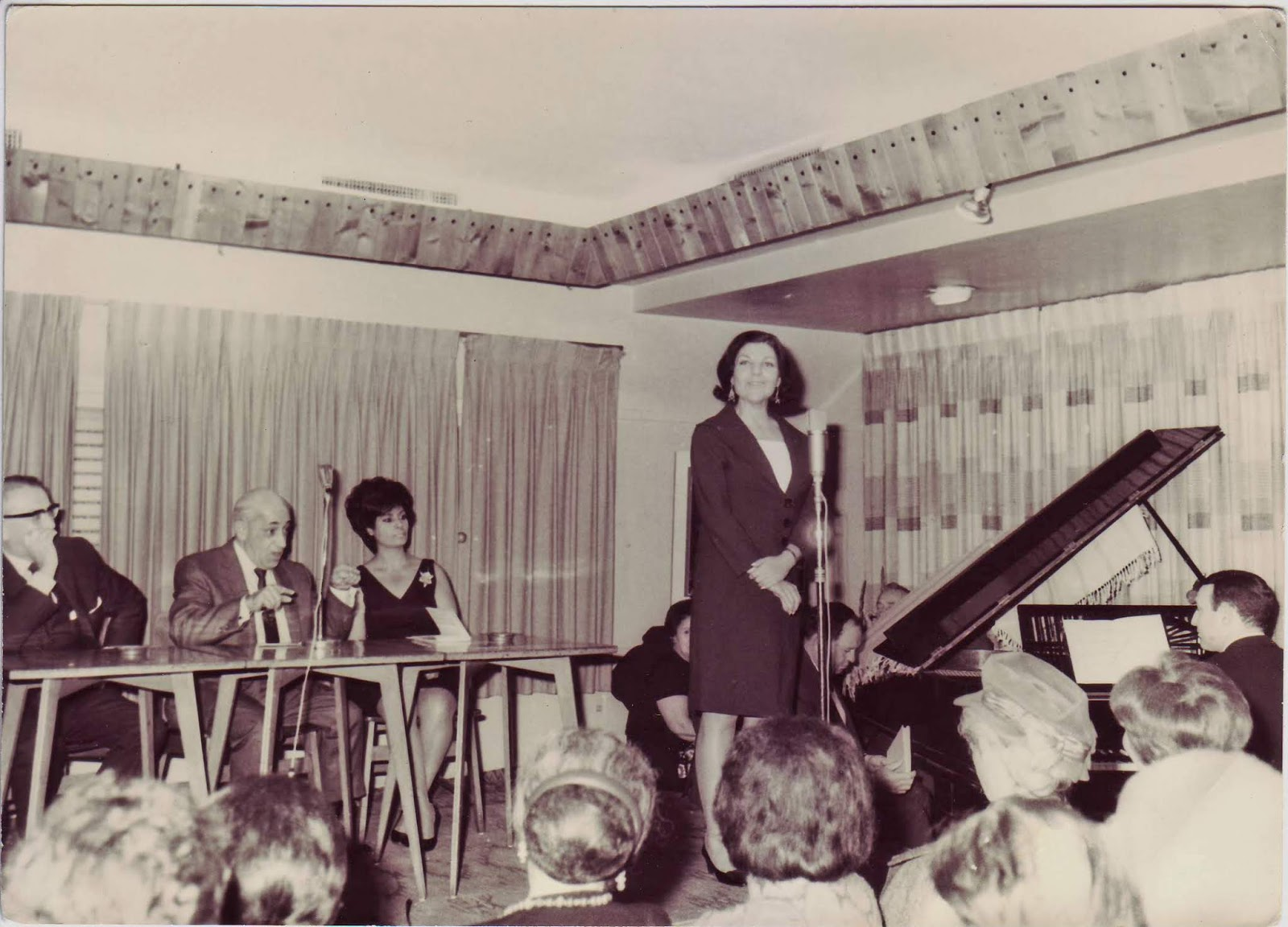 רמה סַמסונוב שרה במסיבה שנערכה במועדון 'מִלוֹא' לכבוד מרדכי זעירא, 8 בדצמבר 1967. זעירא יושב במרכז השולחן ולידו שושנה דמארי ומנחם אבידום. ליד הפסנתר: שמעון כהן. תודה ליובל זעירא על התמונה